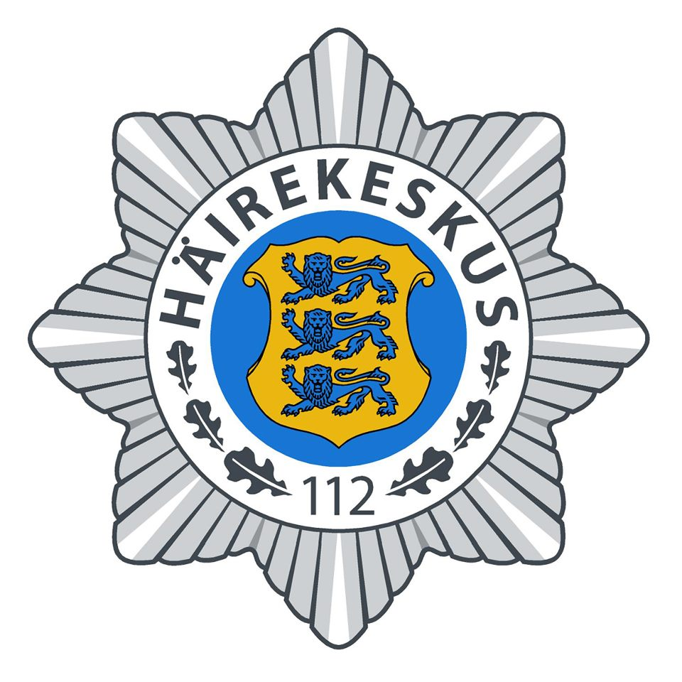 Häirekeskuse embleem